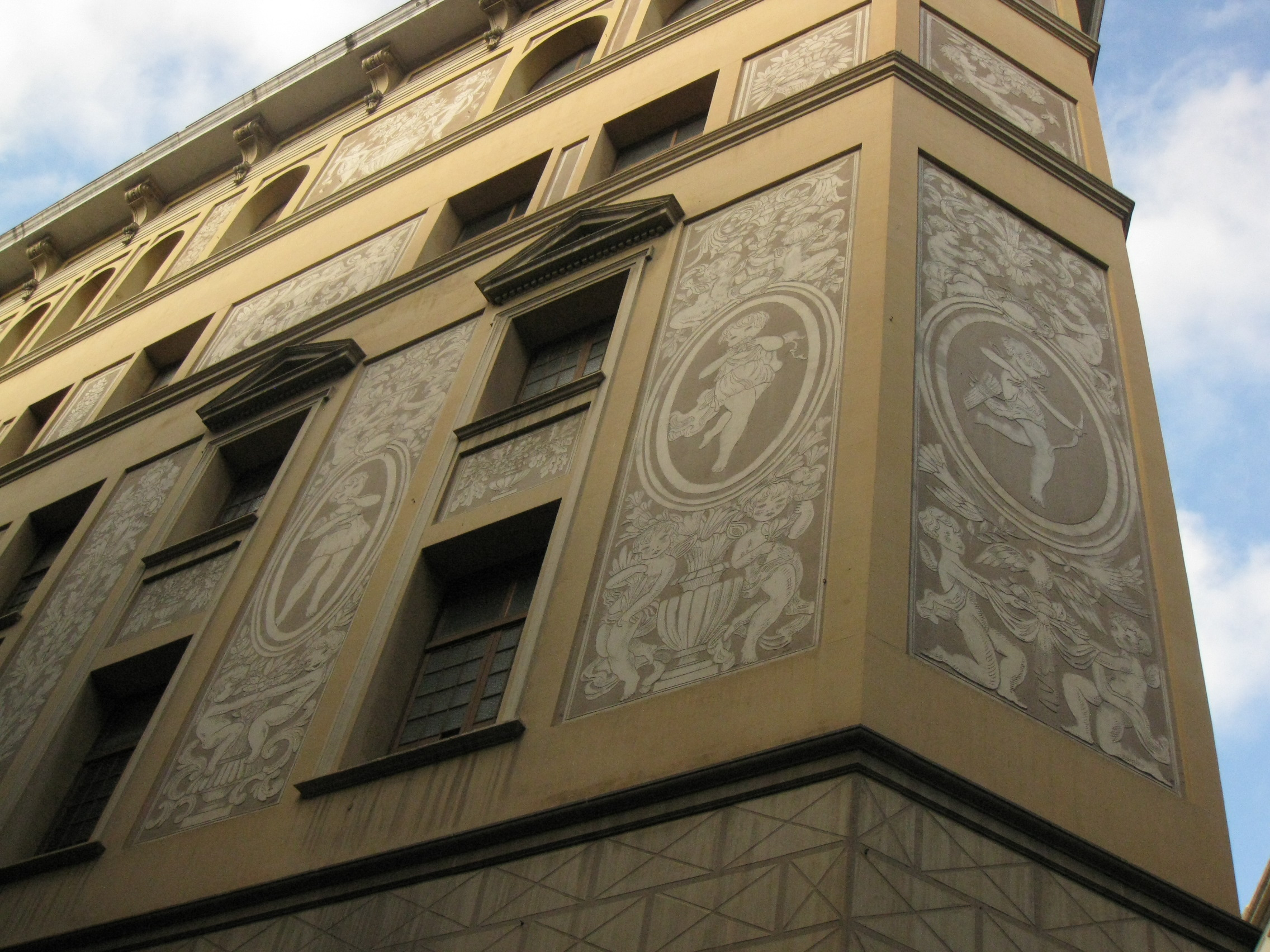 Edifici escolar de 1918-22, amb façanes a la Via Laietana i als carrers Salvador Aulet i Sotstinent Navarro, al barri Gòtic de Barcelona. Està adornat amb terracotes i esgrafiats de tema infantil, de Francesc Canyelles. Vista de la façana del carrer Sotstinent Navarro.